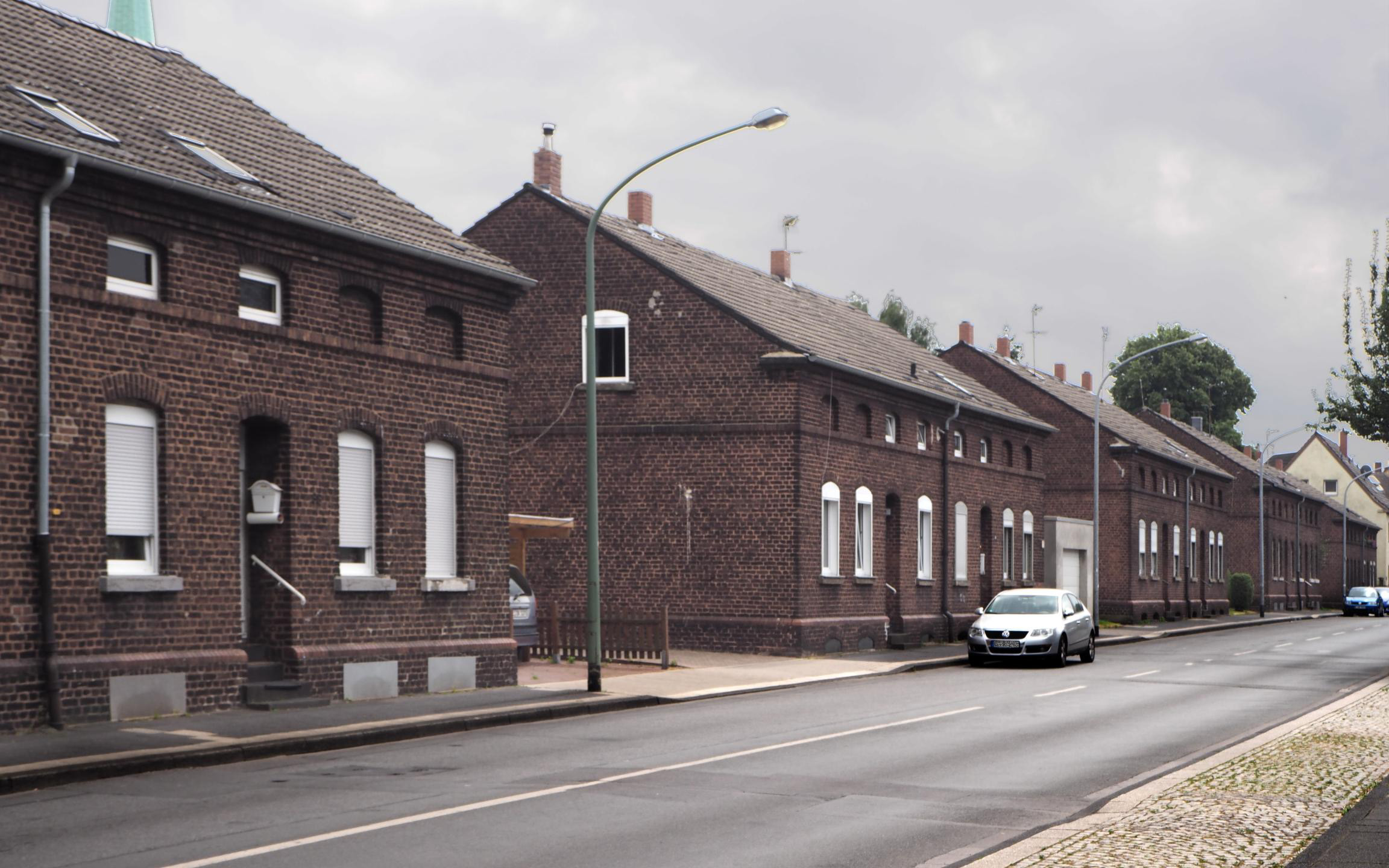 Essen, Siedlung Hegemannshof, Viktoriastraße